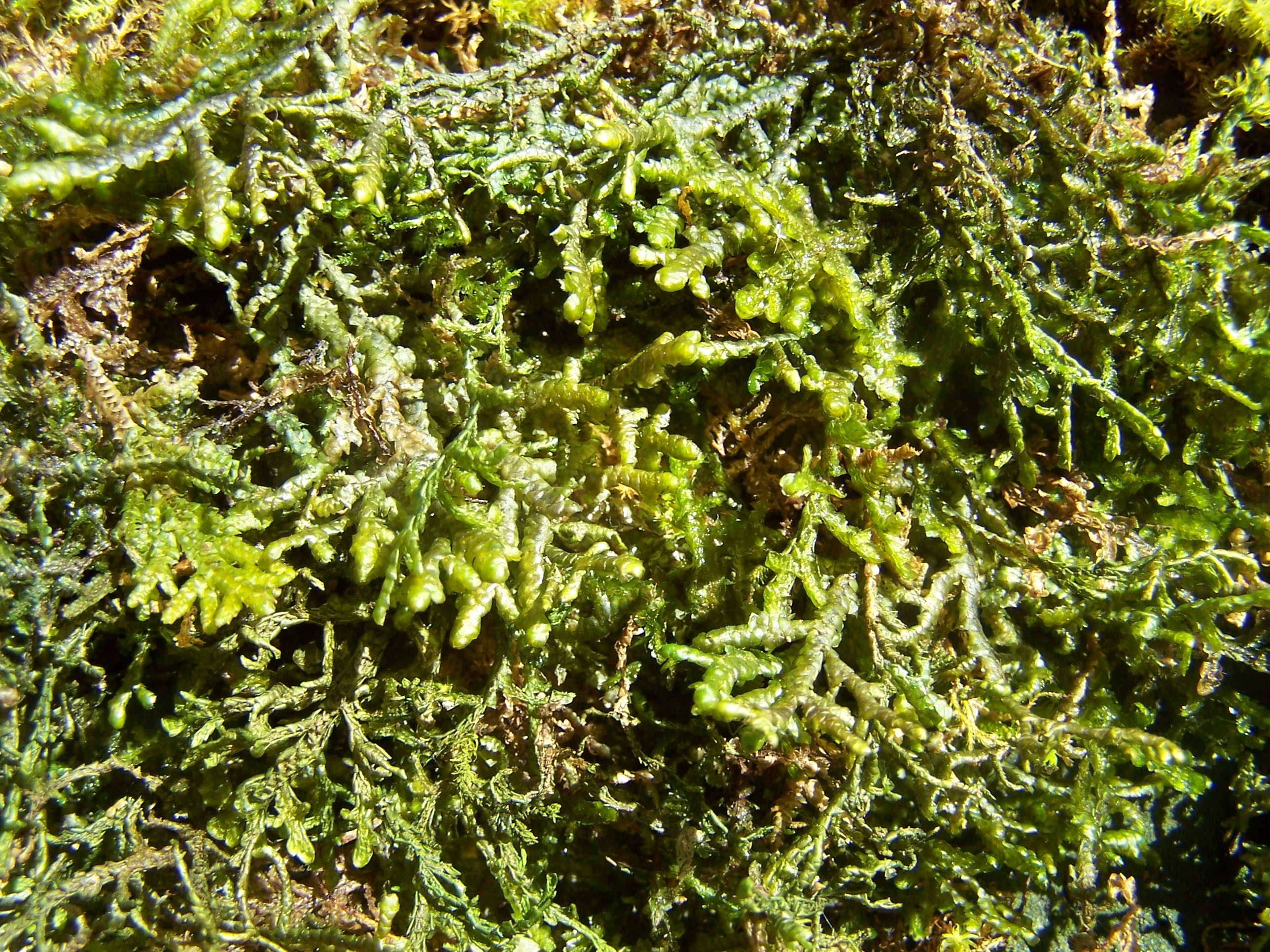 Porella arboris-vitae (Dicks.) Grolle (family : Porellaceae), Ardèche (O7), France